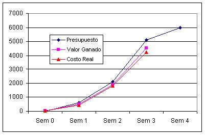 Grafico de ejemplo de aplicacion de la metodologia del valor ganado